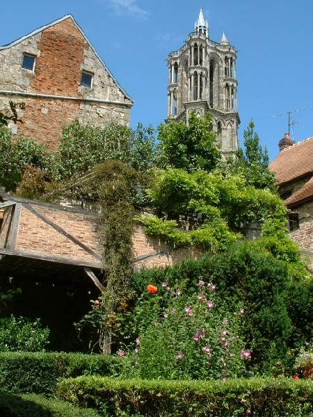 ambiance fleurie du vieux Laon. Au fond, le clocher de la Cathédrale